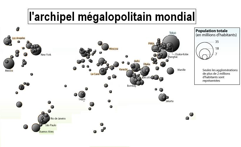 Carte représentant l'Archipel Mégalopolitian Mondial (AMM) réalisée à partir d'un document des Nations Unies de 2003.